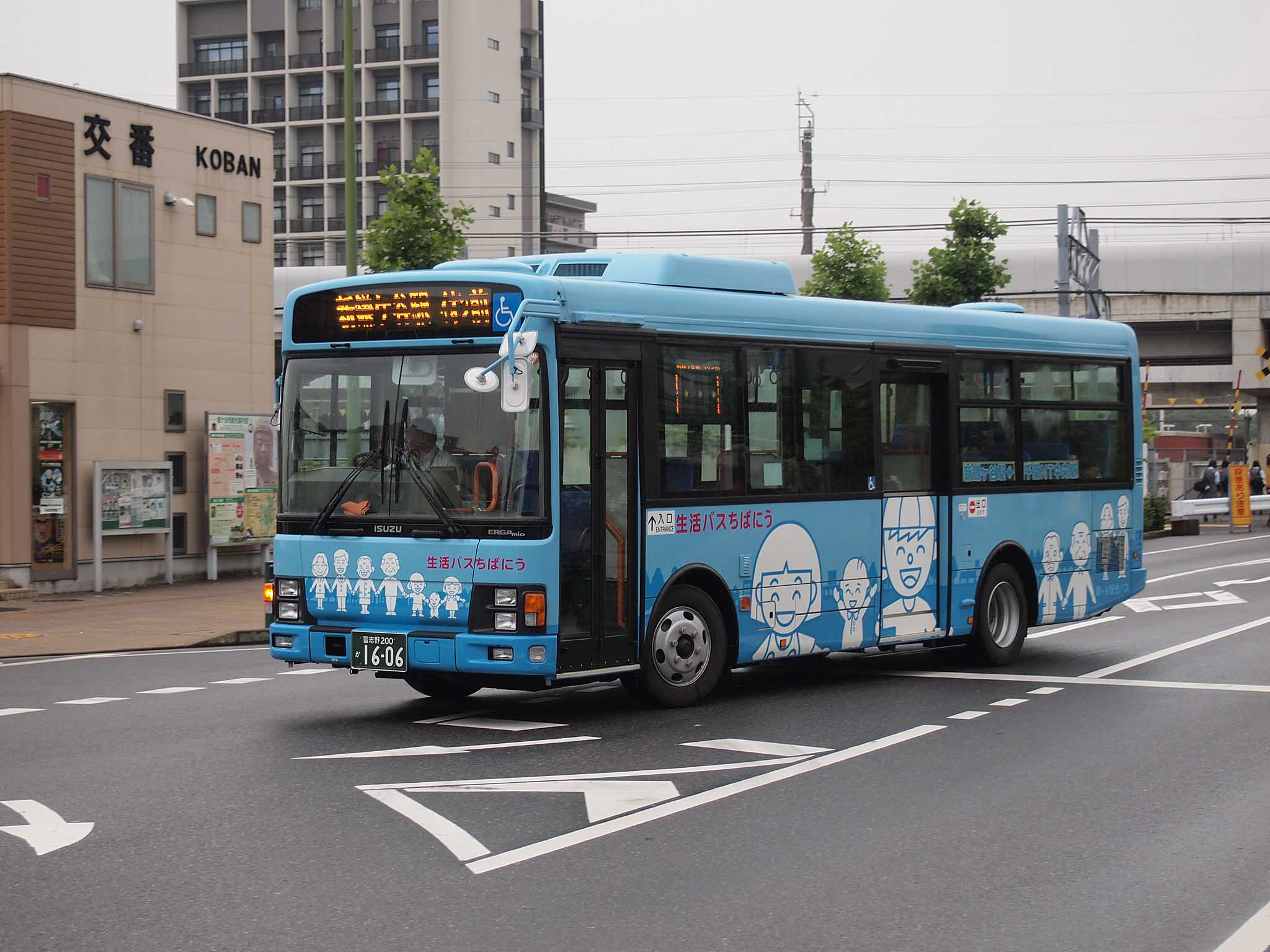 鎌ヶ谷観光バスが運行する「生活バスちばにう」の車両。 型式：いすゞ・エルガミオ ワンステップ SDG-LR290J1 登録番号：習志野200か1606 撮影地：千葉県鎌ヶ谷市、新鎌ヶ谷駅